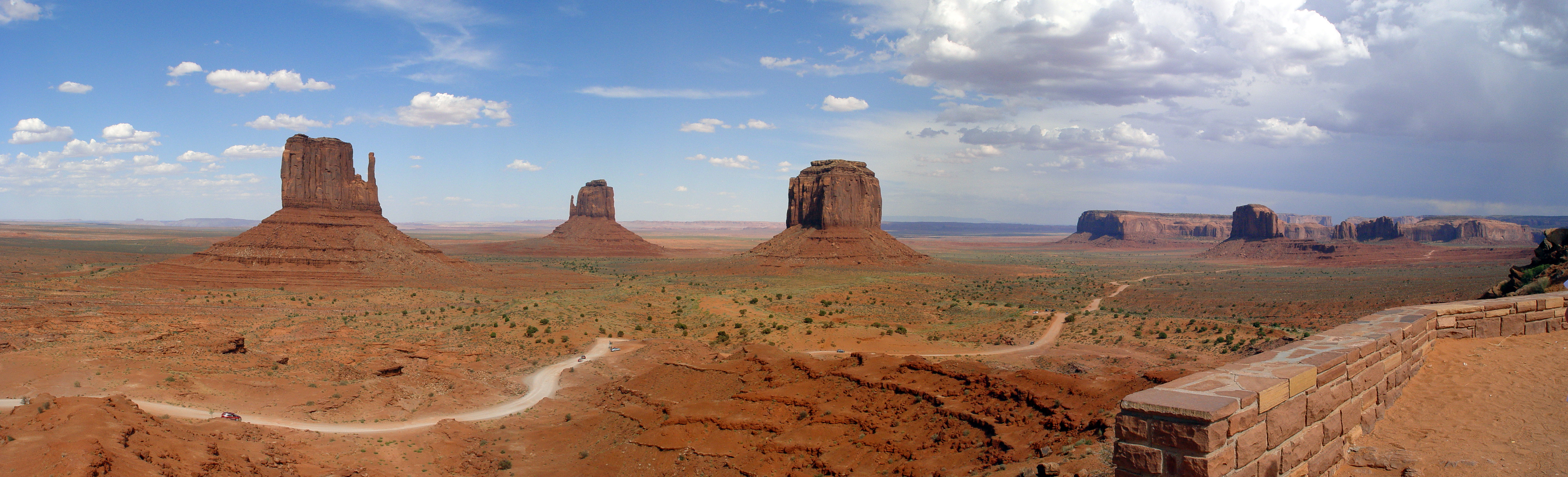 USA. Monument Valley. Both "Mitten Buttes", "Merrick's Butte"